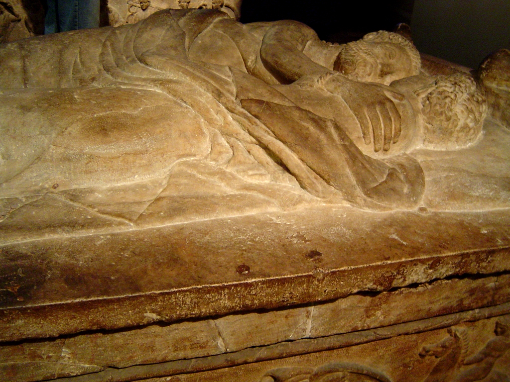 Coperchio a kline con estremità displuviate sormontate da acroteri. I defunti abbracciati sotto il mantello, secondo le iscrizioni presenti, sono il figlio della coppia rappresentata nel sarcofago proveniente dalla stessa tomba (Boston, MFA 1975.799) e la moglie. Sul lato lungo della cassa un combattimento tra Greci e Amazzoni, sui due lati brevi combattimenti tra animali, reali e fantastici. Forte impronta stilistica derivata dalla tarda classicità greca.Detail from lateral view.